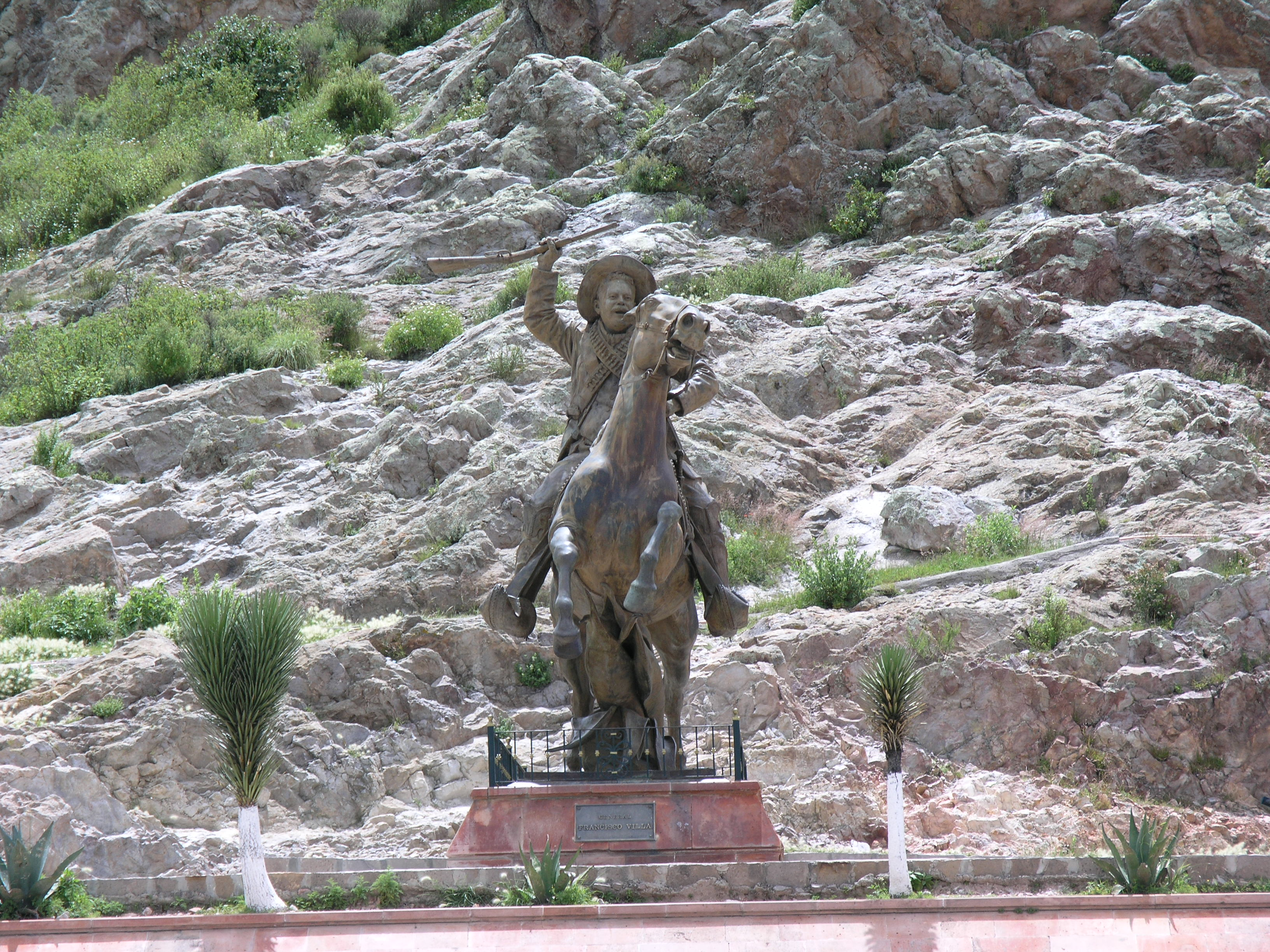 Denkmal für Pancho Villa auf dem Cerro de la Bufa